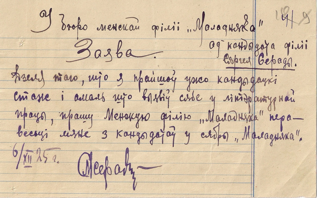 Беларуская (тарашкевіца): Заява беларускага паэта Сяргей Дарожнага на ўступленьне ў літаратурнае аб'яднаньне Маладняк